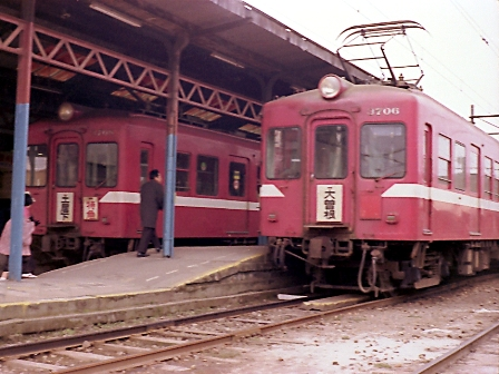 名鉄3700系電車(瀬戸線)